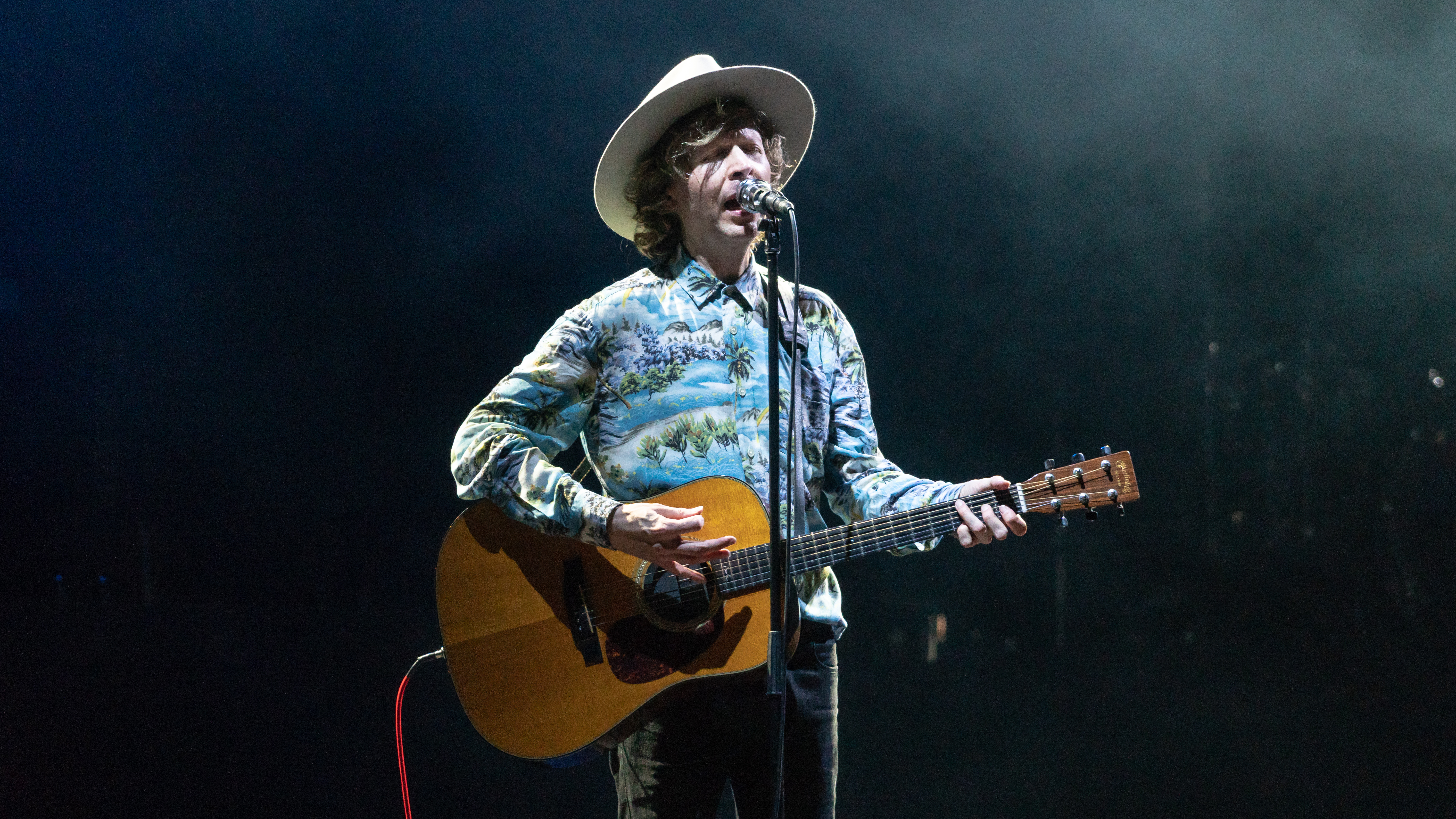 OhanaSep18-204